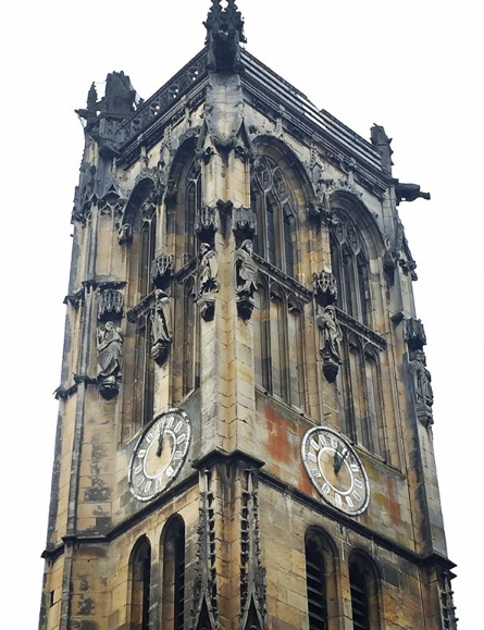 Tour Henri IV de l'église Saint-Pierre de Carville à Darnétal (76).